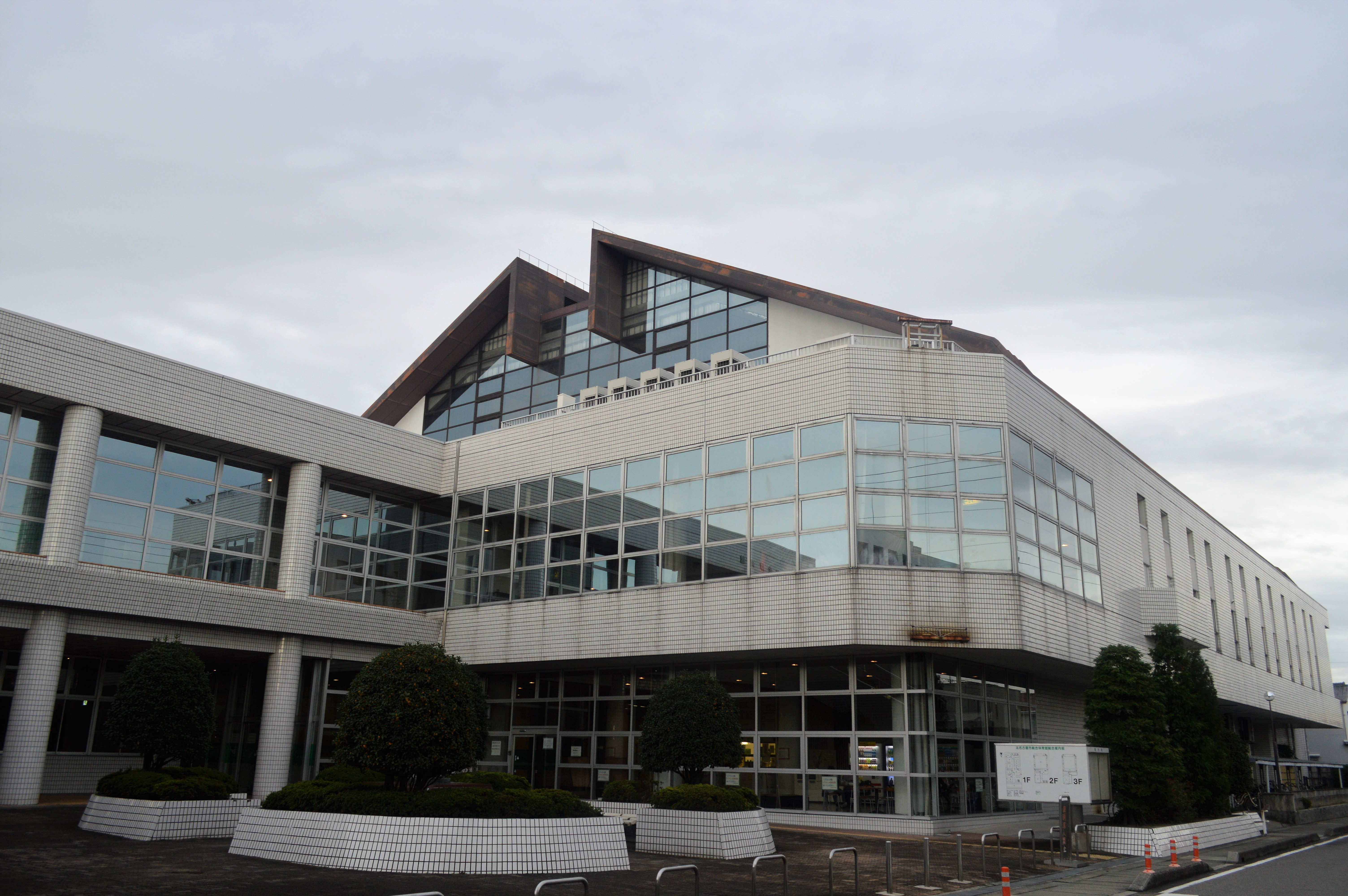 愛知県にある北名古屋市総合体育館。